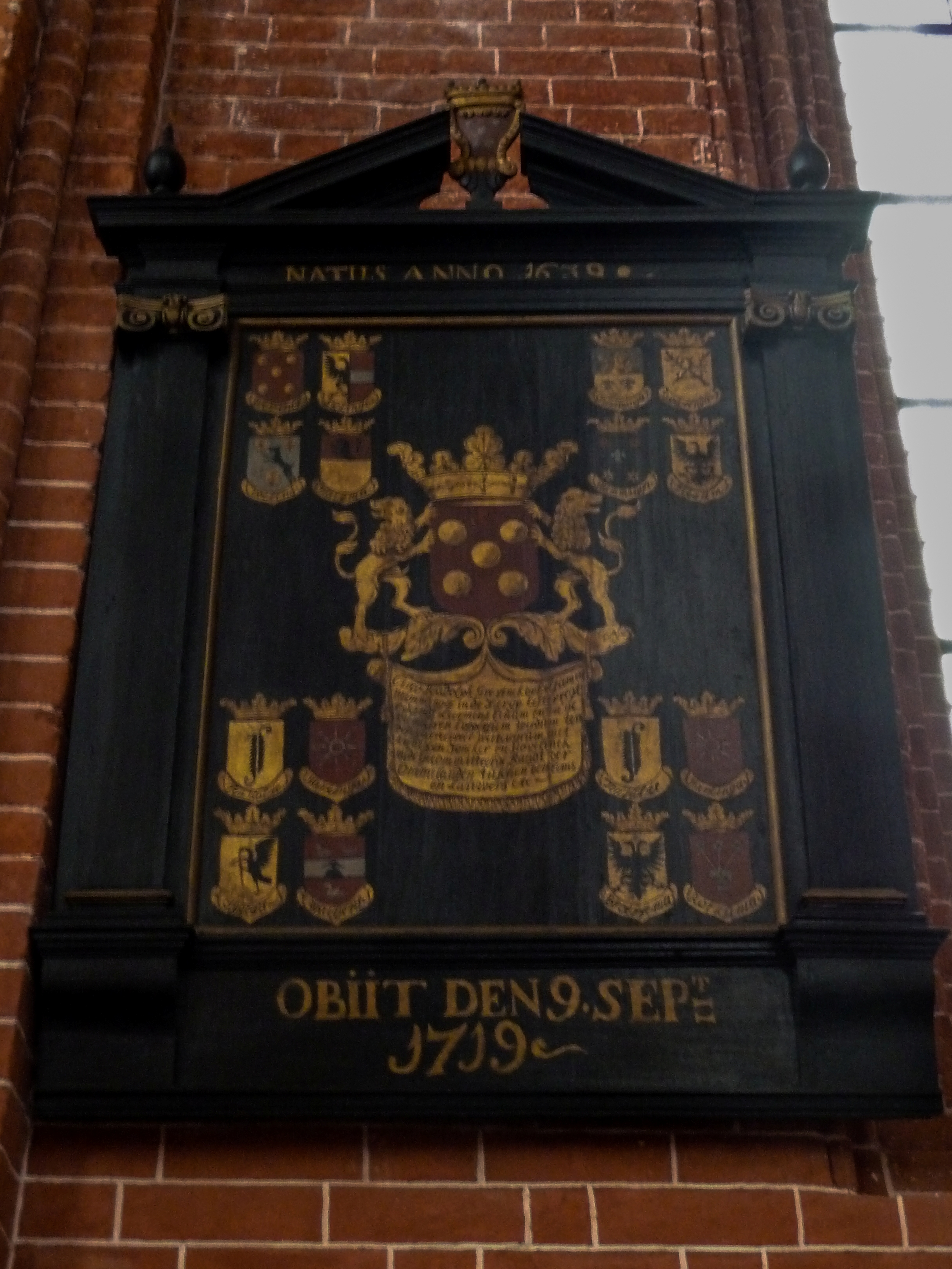 Rouwbord van Circo Rudolph Grevinck (overleden 1719) in de Jacobuskerk